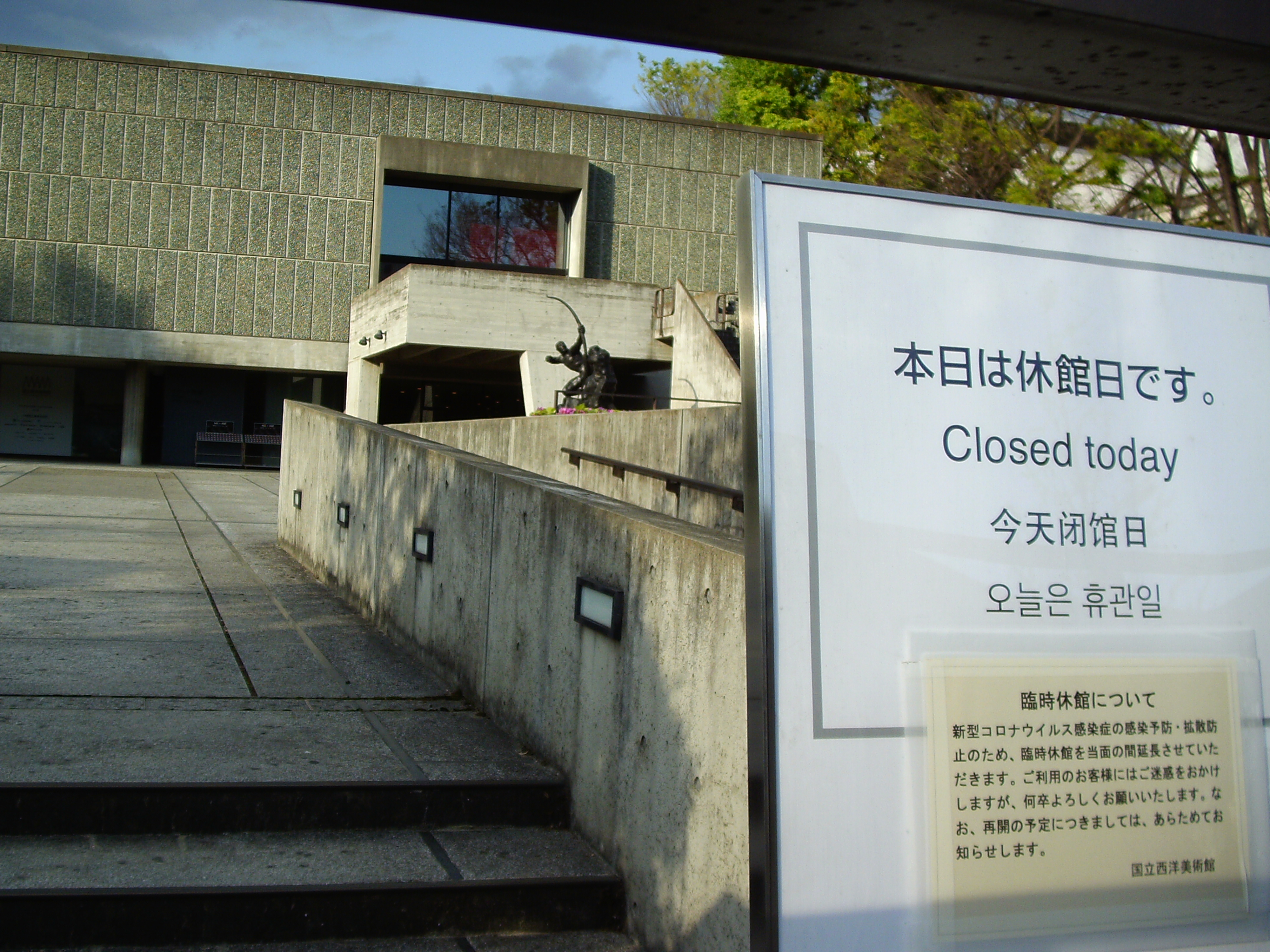 巣籠りで2,3日一歩も家から出なかったところ血行が悪くなり手足末端が痺れてきたため、早朝の人出が少ない時間に自転車で行ける上野公園まで走り運動してきた。